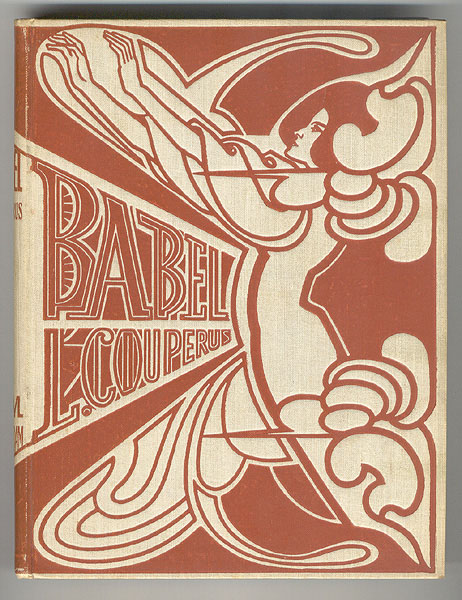 Boekomslag: Babel. 1e druk 1901. Auteur: L. Couperus. Bandontwerp: J. Toorop. Uitgeverij: L.J. Veen